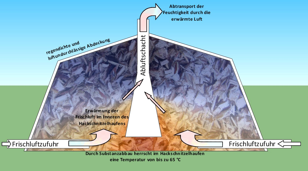 Dombelüftung